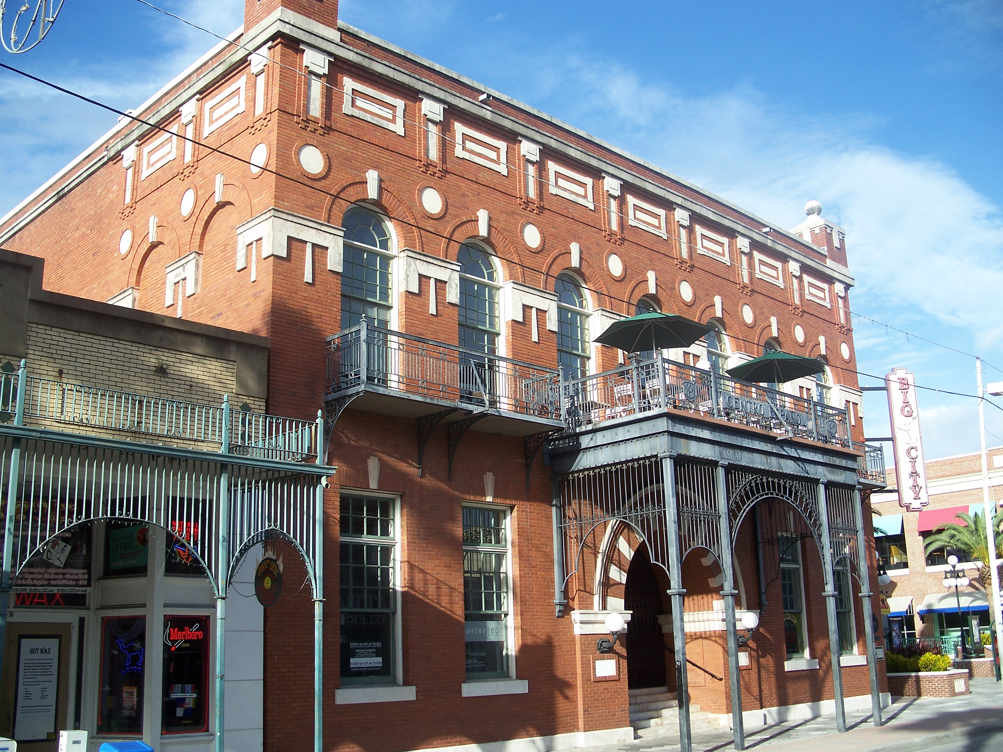 El Centro Espanol de Tampa, in Tampa, Florida